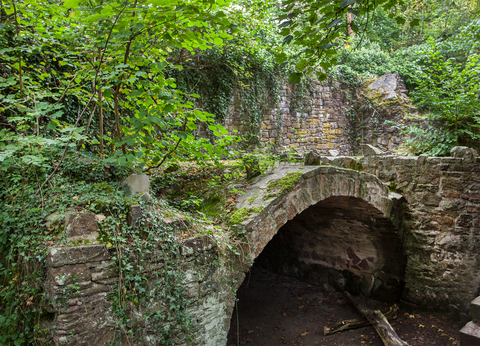 Burgruine in Vlotho auf dem AmtshausbergThis is a photograph of an architectural monument.